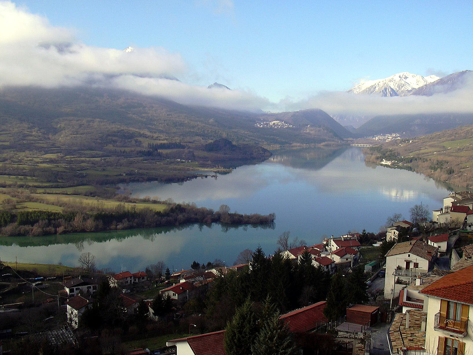 Lago di Barrea (L'Aquila.Italy)nel parco nazionale d'Abruzzo